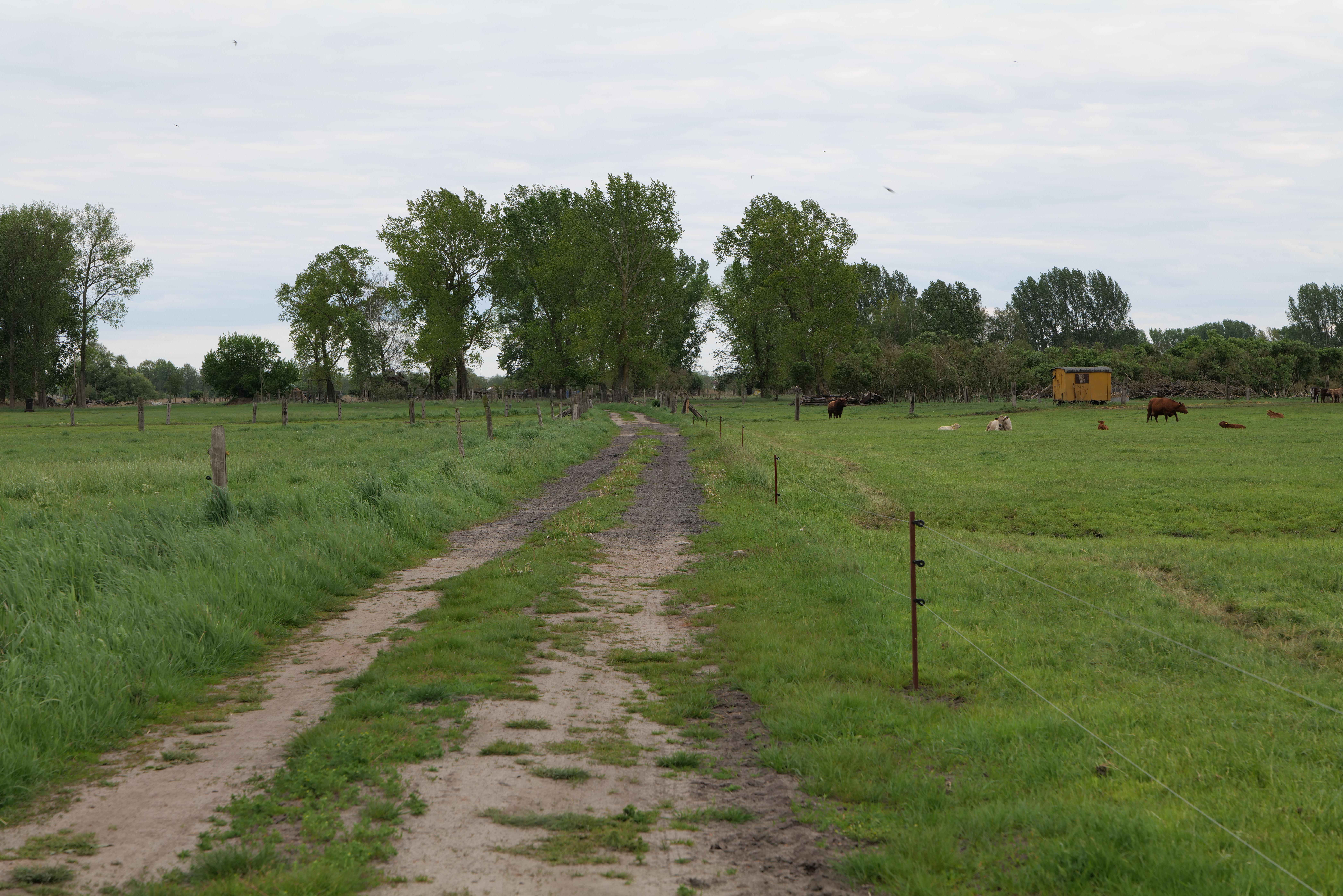 Oberes Rhinluch bei Hakenberg am 15. Mai 2020.